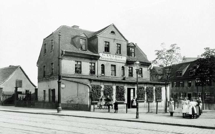 Der Gasthof Neusellerhausen an der Gabelung Wurzner- / Torgauer Straße, 1897, (existiert nicht mehr)